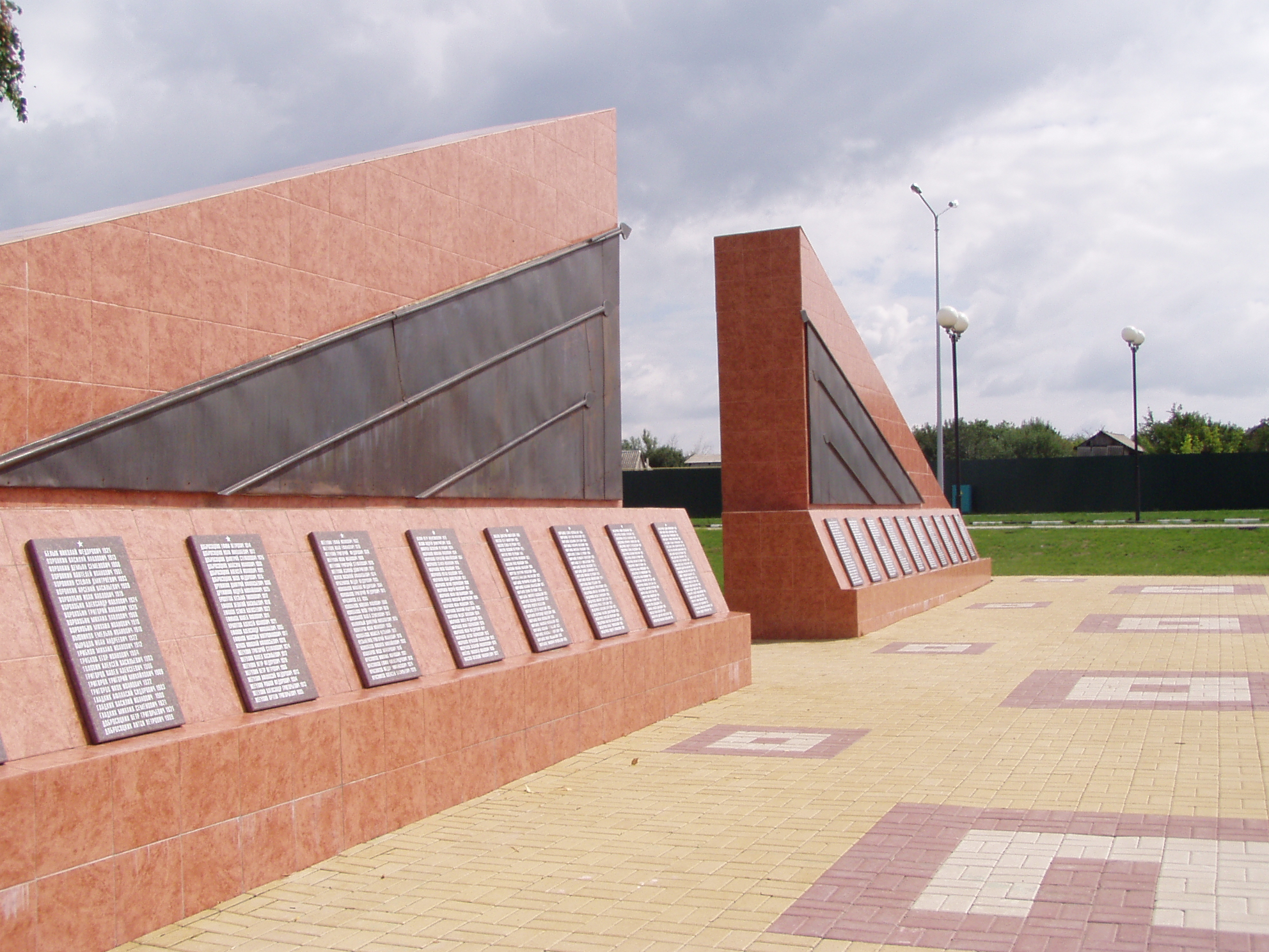 Братская могила 345 советских воинов, погибших в боях с фашистскими захватчиками: в центре села, Муром, Шебекинский район, Белгородская область